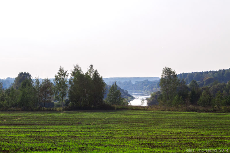 Гацькаўшчына. Крапівенскае поле, месца бітвы пад Оршай 1514 г.